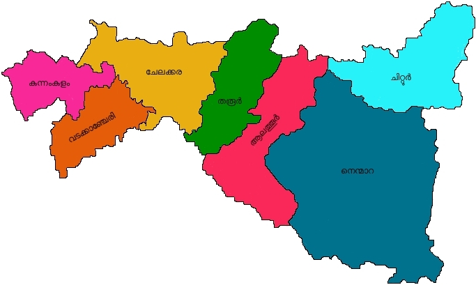 ആലത്തൂർ (ലോക്സഭാ മണ്ഡലം)